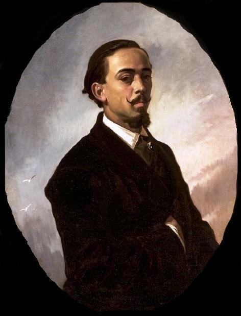 Retrato del pintor español Francisco Tristán Camaño.